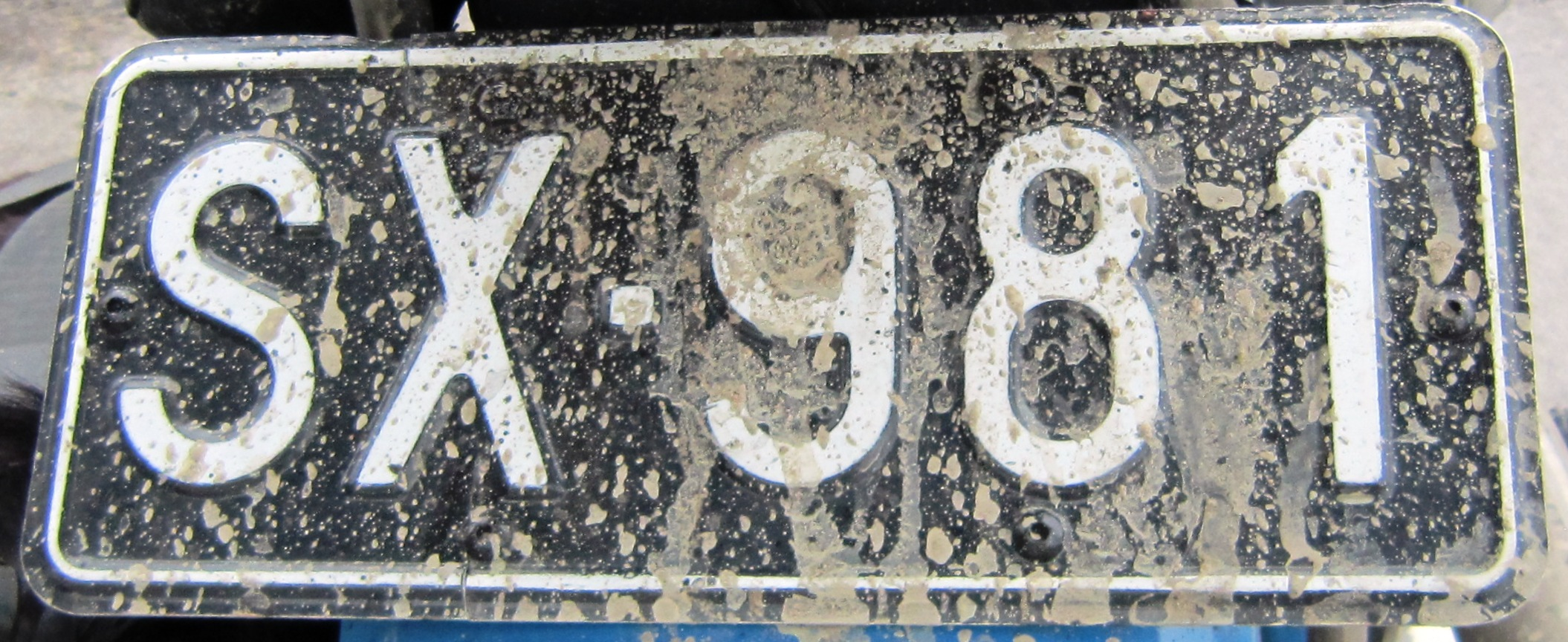 Finland kenteken oud motorfiets